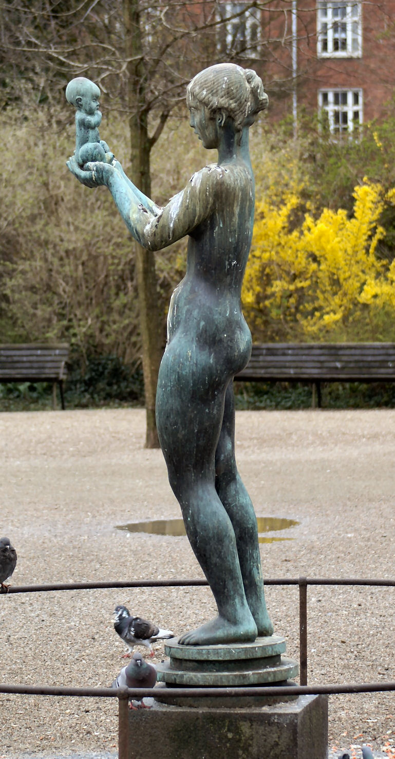 Venus med æblet, Enghaveparken, København, opstillet 1929